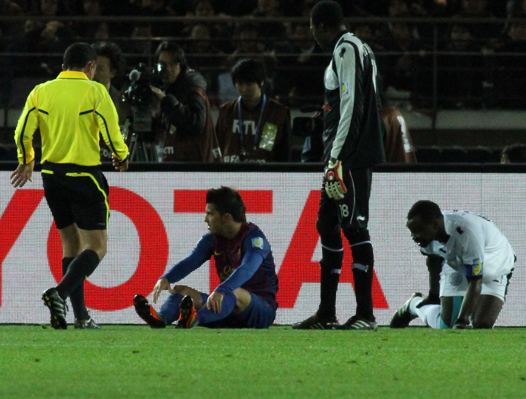 David Villa resultó lesionado de gravedad en la semifinal del Mundial de Clubes, en un partido que enfrentó al FC barcelonal con el Al Saad.